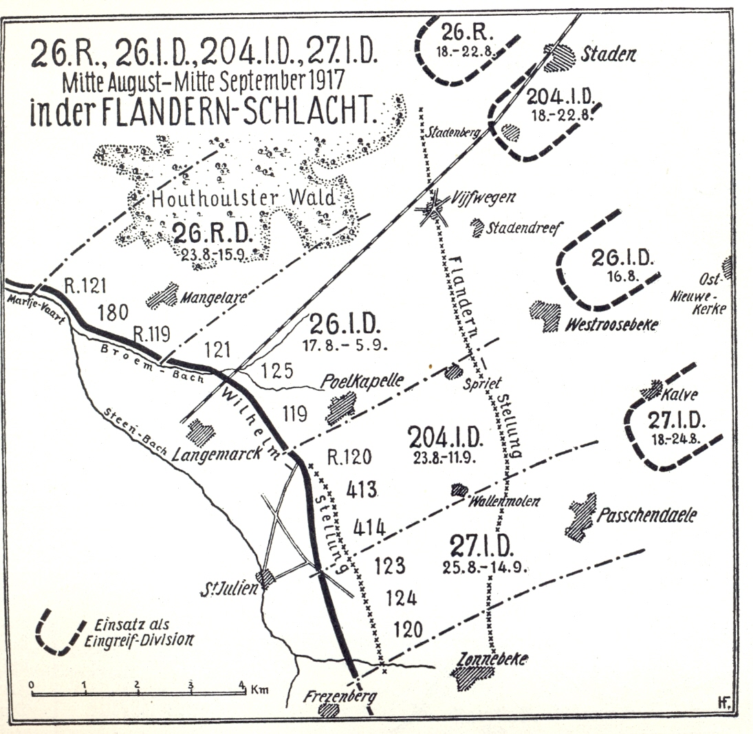 Karte: Württembergische Divisionen (26. Res.-Div., 26. Inf.-Div., 27. Inf.-Div., 204. Inf.-Div.) in der Dritten Flandernschlacht 1917